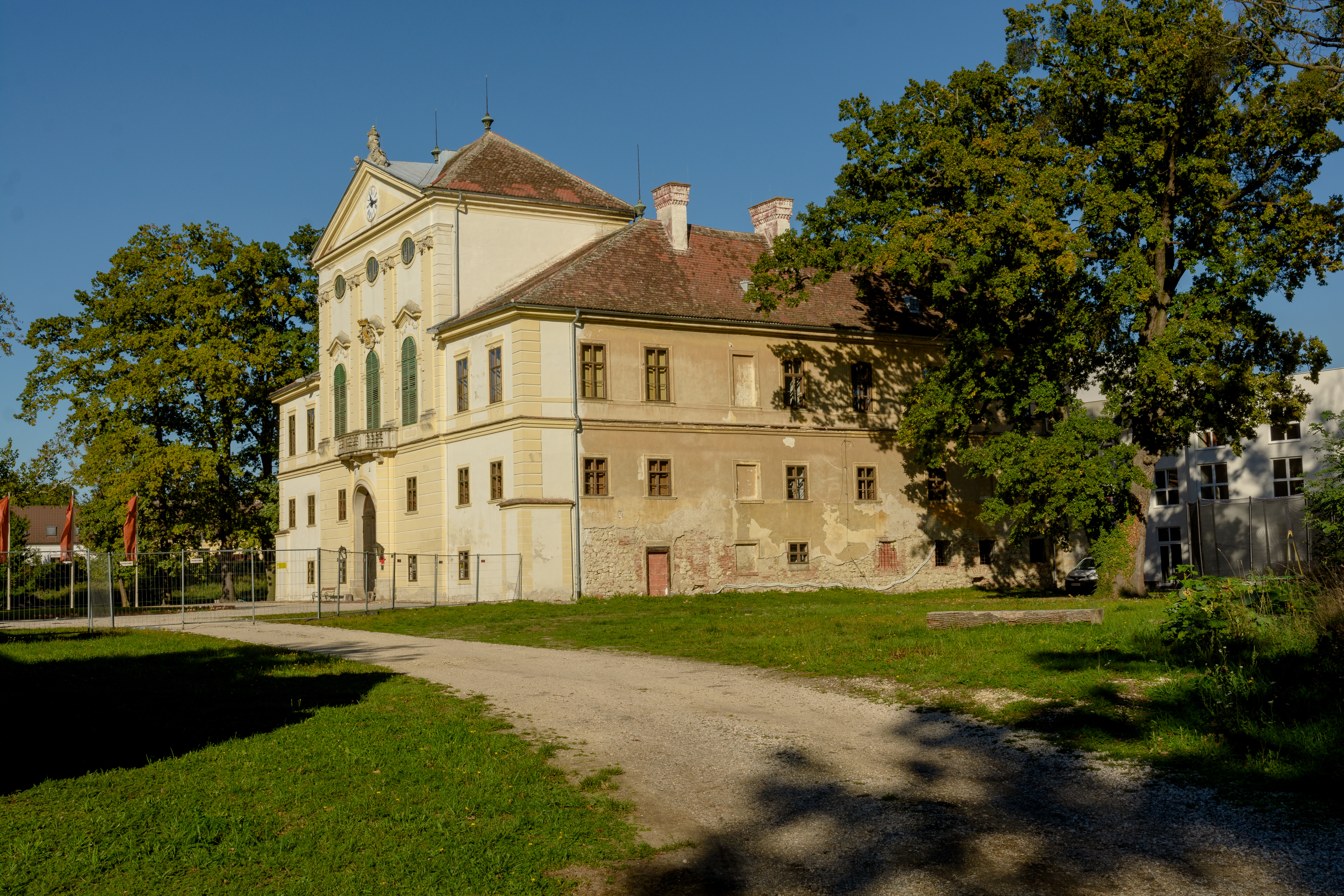 Schloss Kirchstetten/Thermalhotel